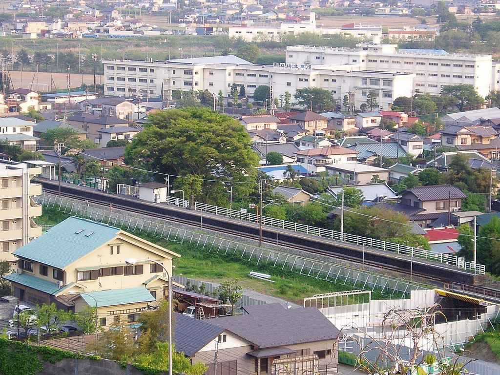 東山北駅遠景